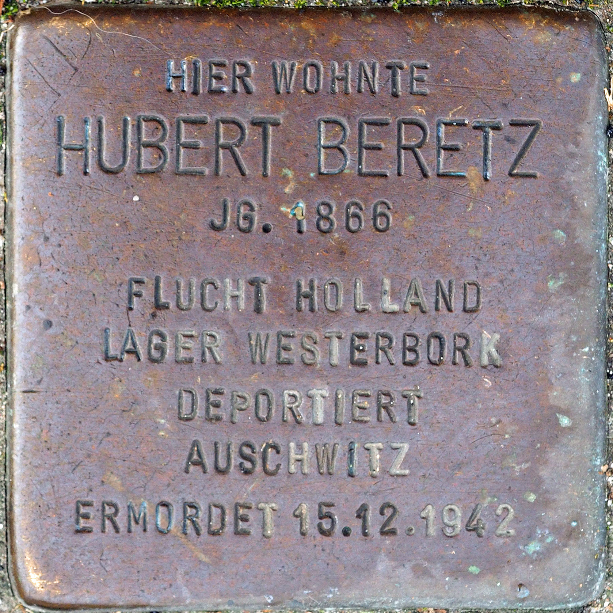 Stolpersteine MG: Berentz, Hubert